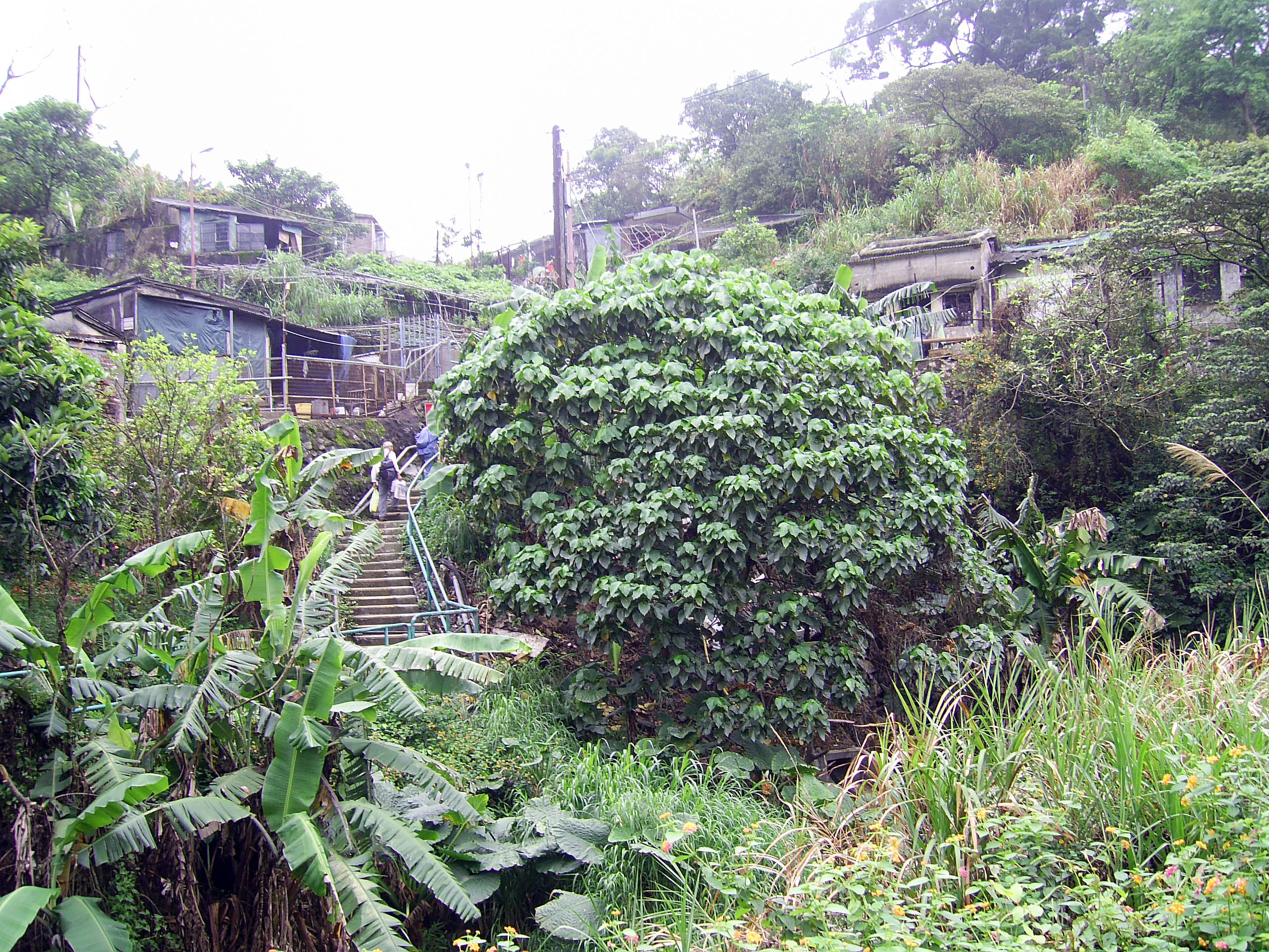 中文（香港）: 馬鞍山上村